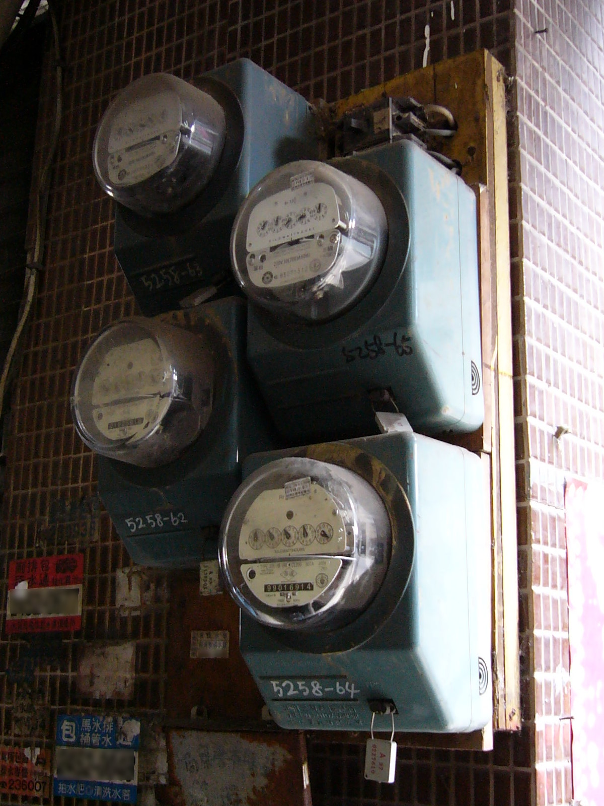 台灣電力公司電表5258-62至5258-65